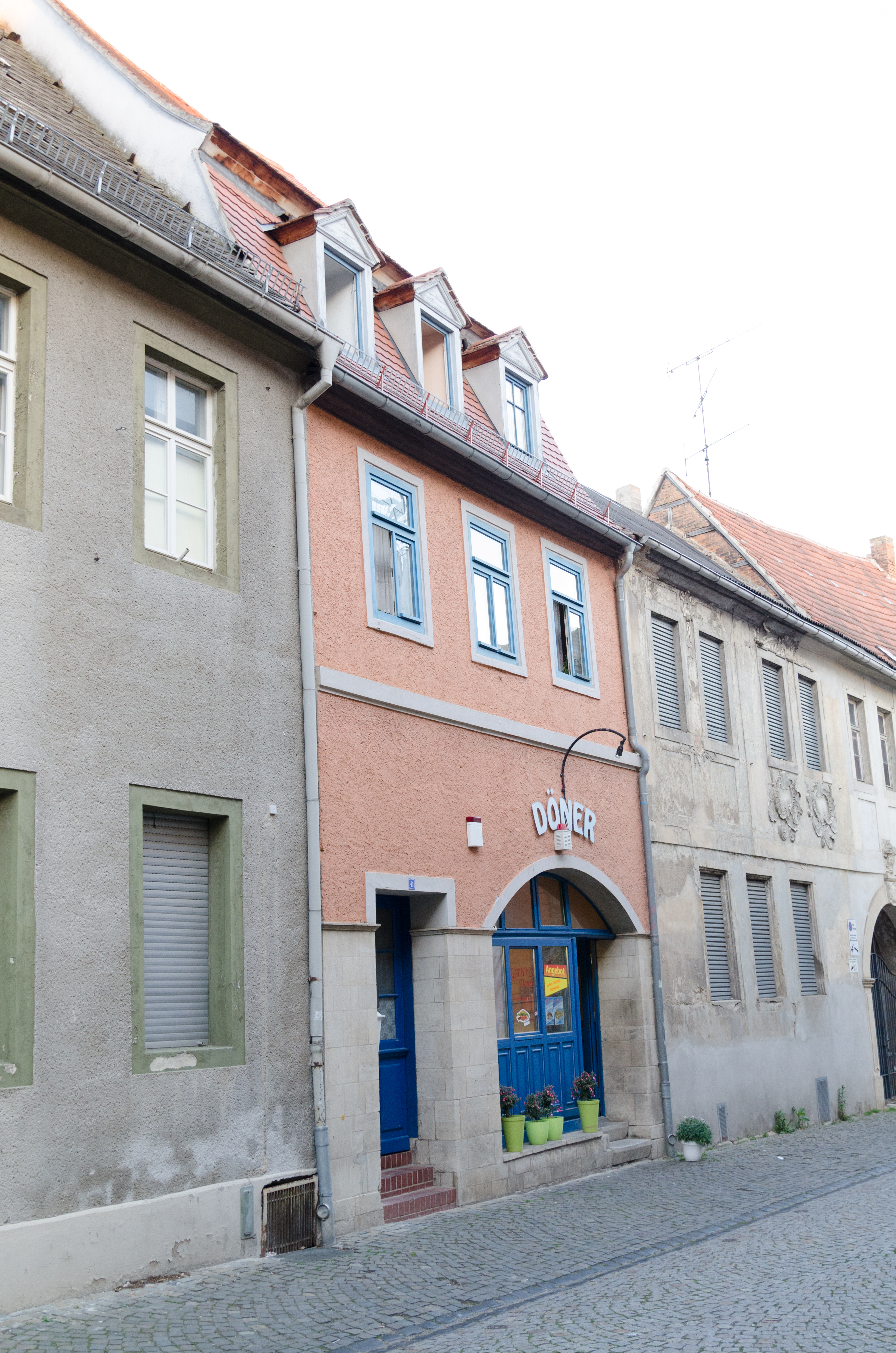 Naumburg, Wenzelstraße 41